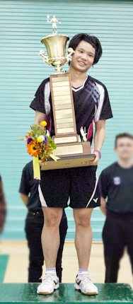 Tai Tzu-ying at 2011 US Open Badminton